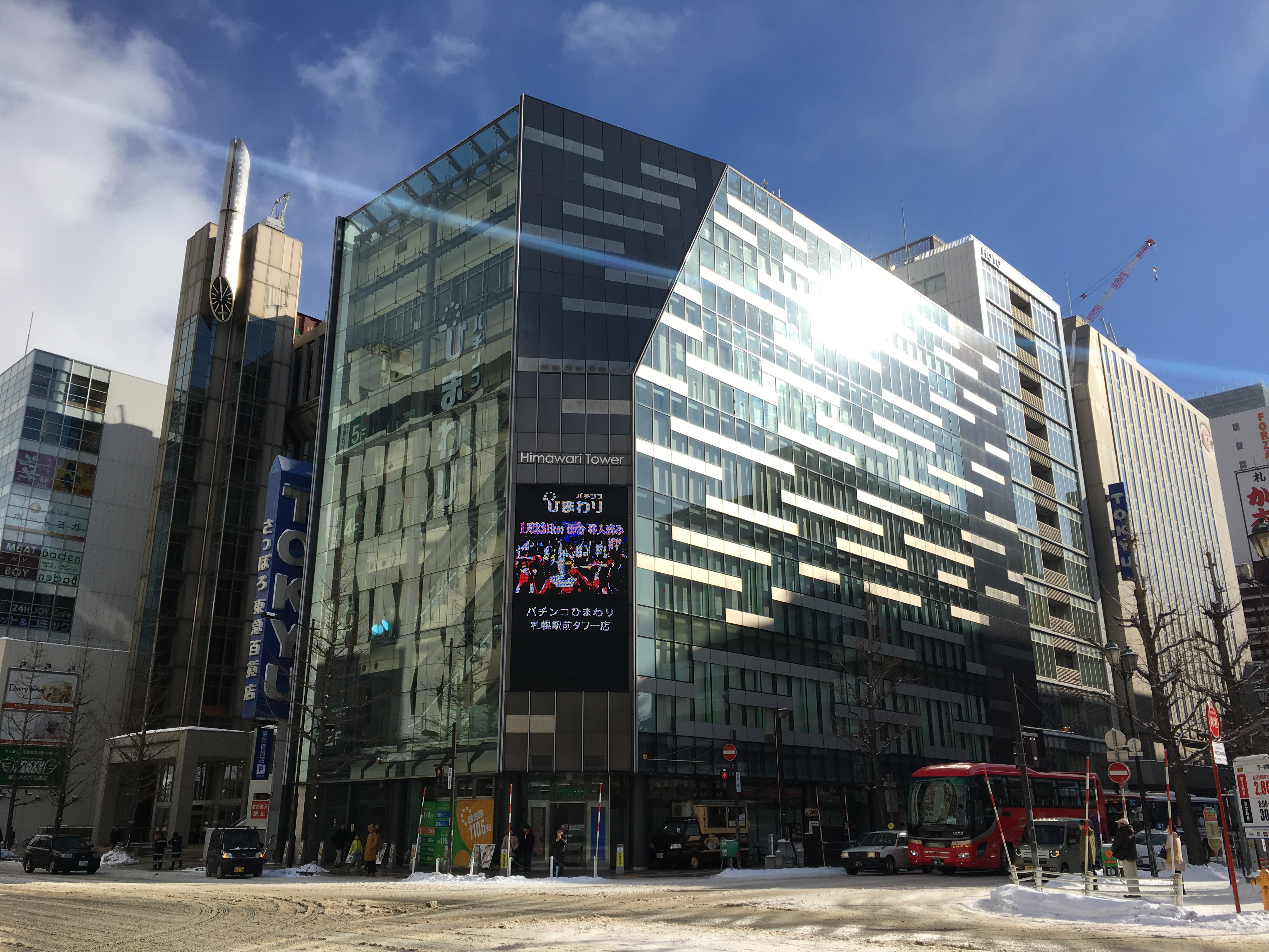 ひまわりタワー（札幌市中央区）